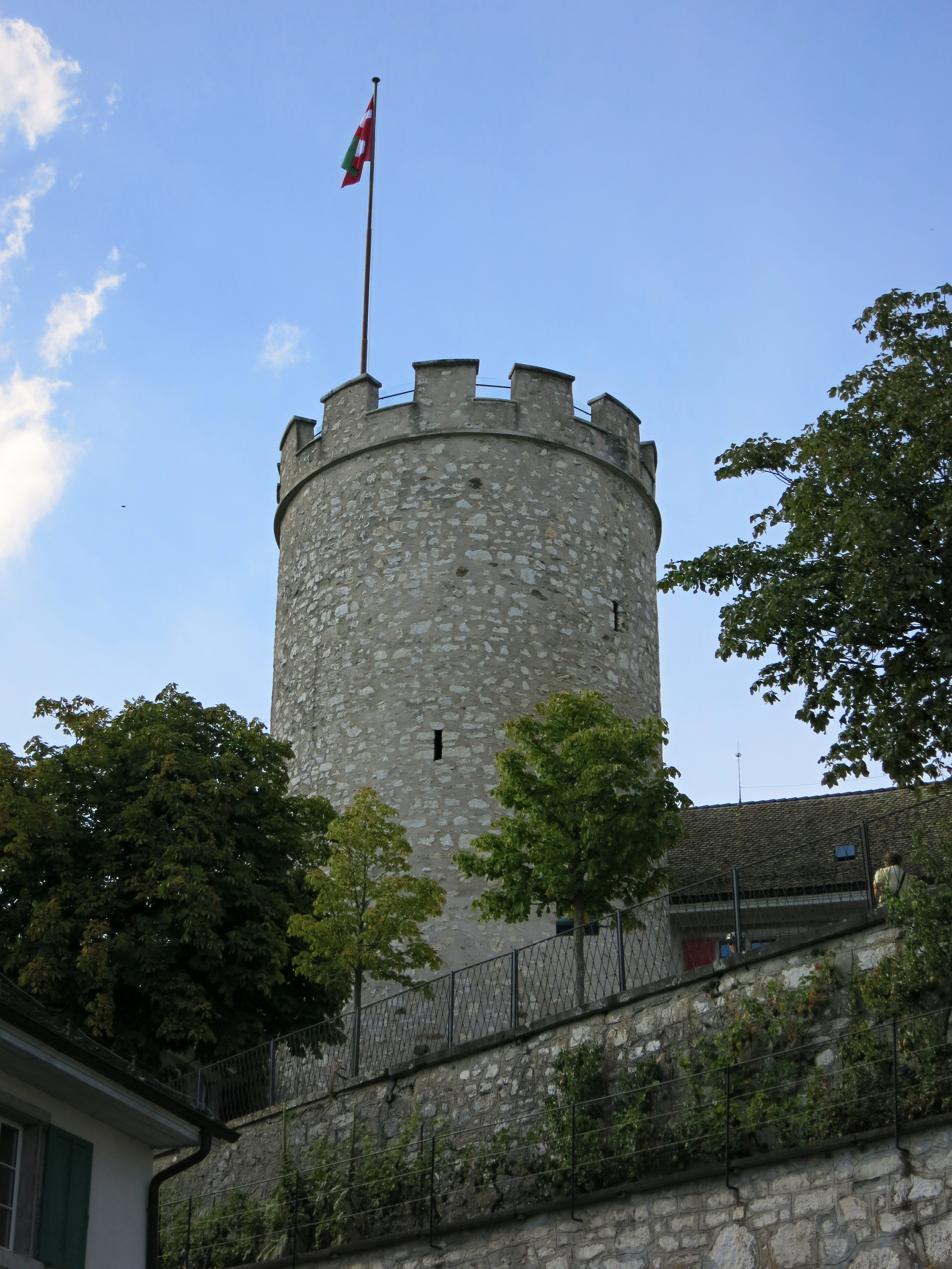 Schlossturm Regensberg